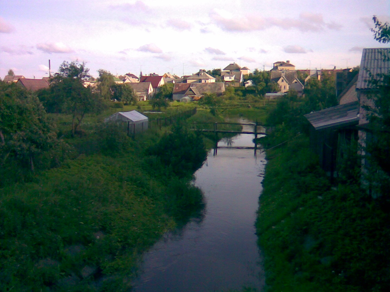 Žemaitėška: Dorbėna opelis Telšiūs